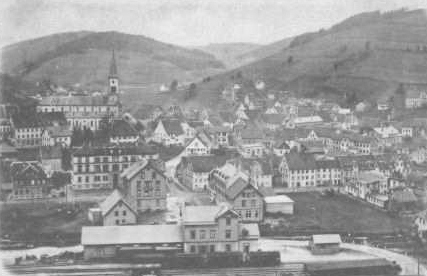 Foto-Postkarte: Der Bahnhof von Furtwangen an der Bregtalbahn 1900. Im Hintergrund ist die Stadt Furtwangen sichtbar. Im Vordergrund der Bahnhof und die Gleisanlagen. Postkarte aus dem Jahr 1900. Quelle